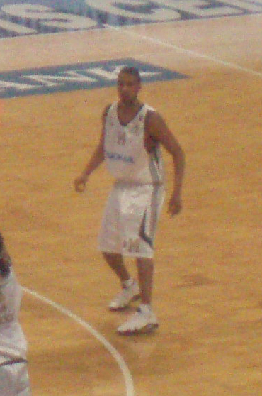 Can Akan